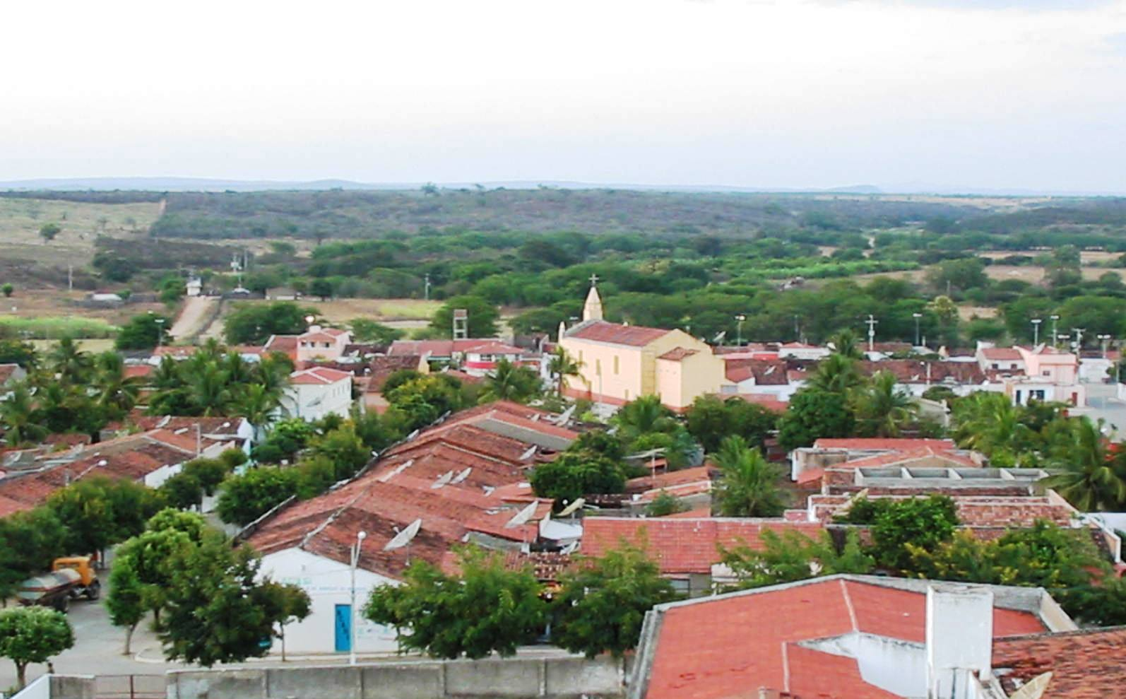 Ingazeira vista do Alto da Caixa D'agua